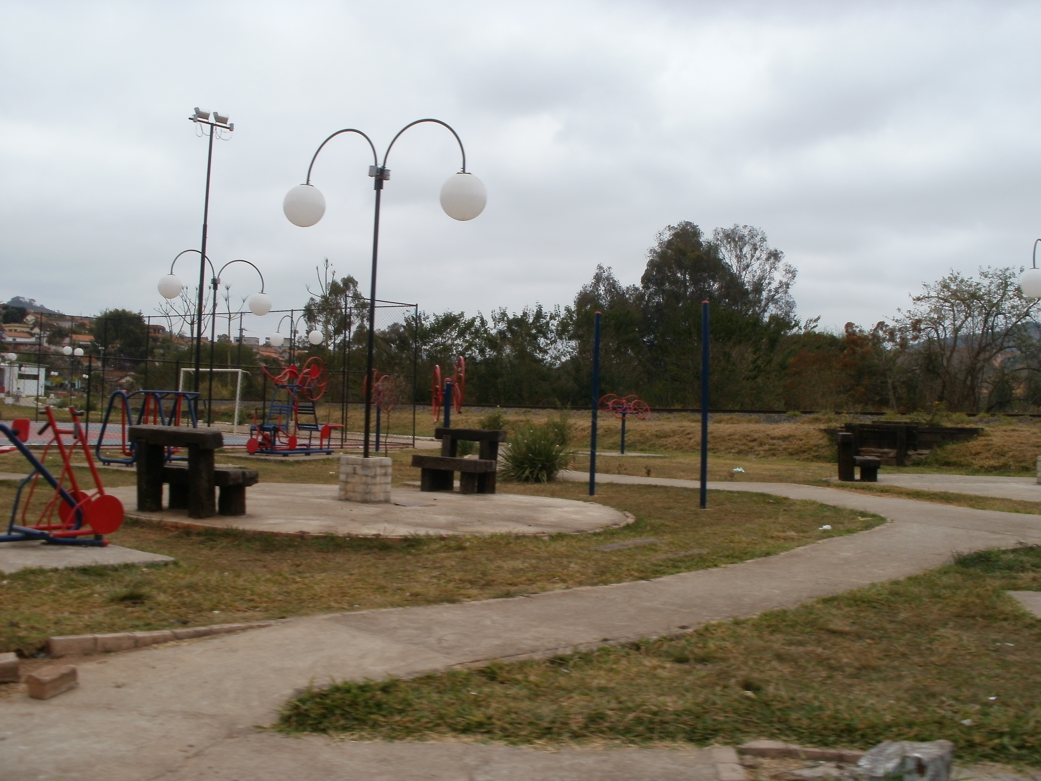 Vista de uma praça em Arantina - Minas Gerais, Brasil.